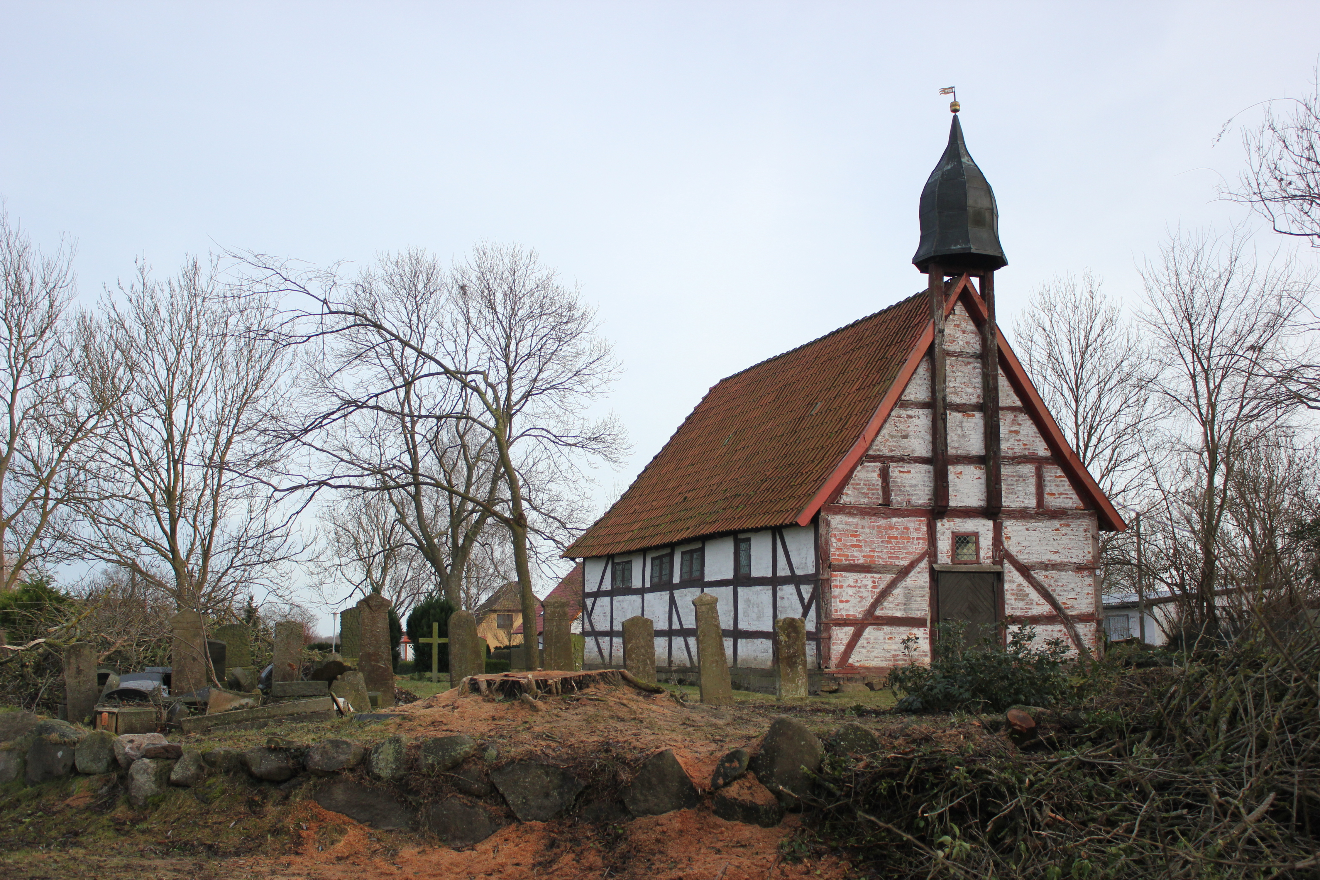 Blick von Nordwesten auf die Kapelle Jarmshagen.